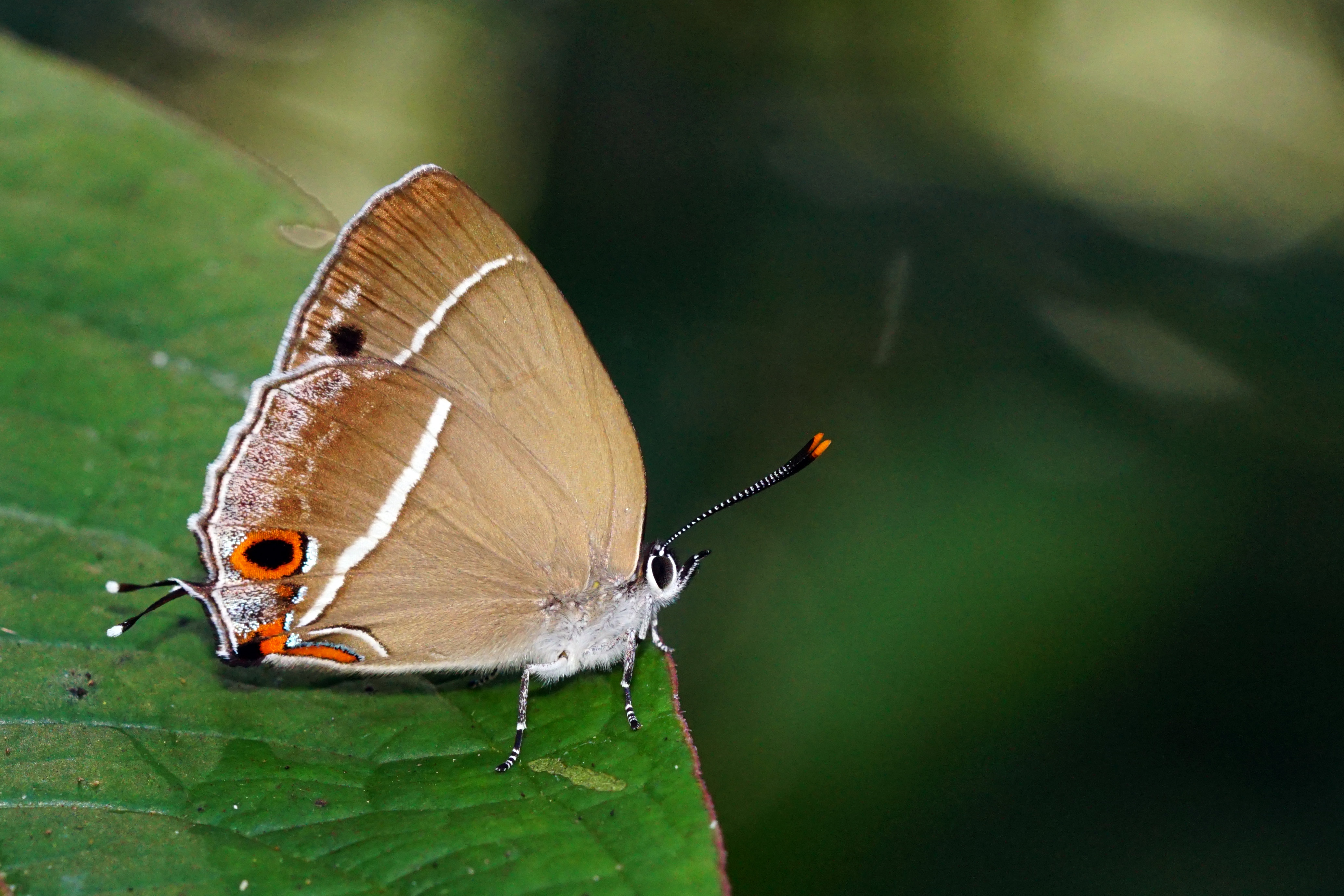 單線翠灰蝶 Chrysozephyrus splendidulus （雌）